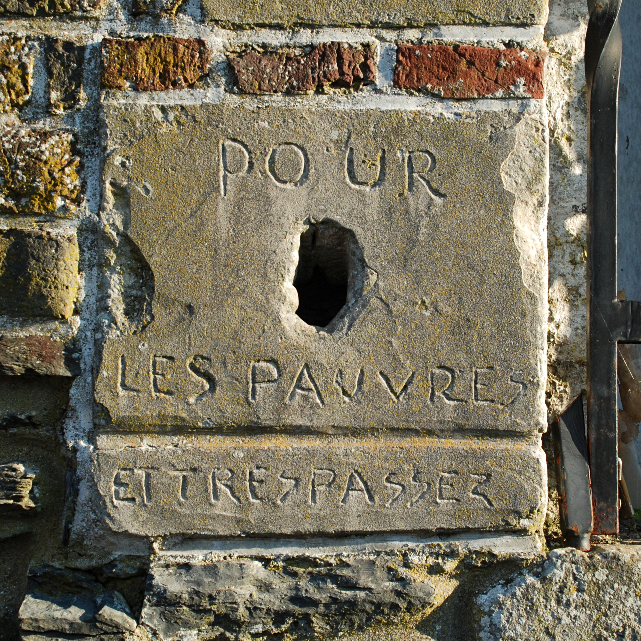 Belgique - Brabant wallon - Ottignies - Manoir de Franquenies -chapelle Notre-Dame des Fièvres et de Consolation (état 2016 : dégradation depuis 2014)